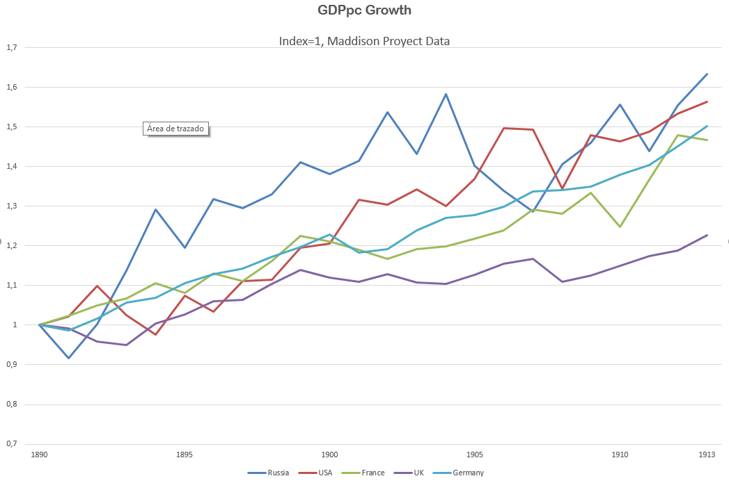 Evolución del PIB per capita de la Rusia zarista en comparación a otras potencias